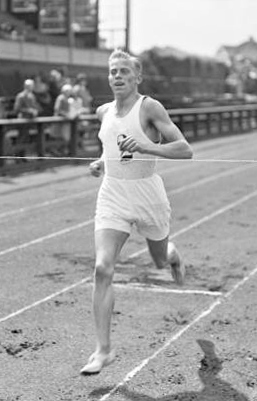 Henry Nielsen (athlete)